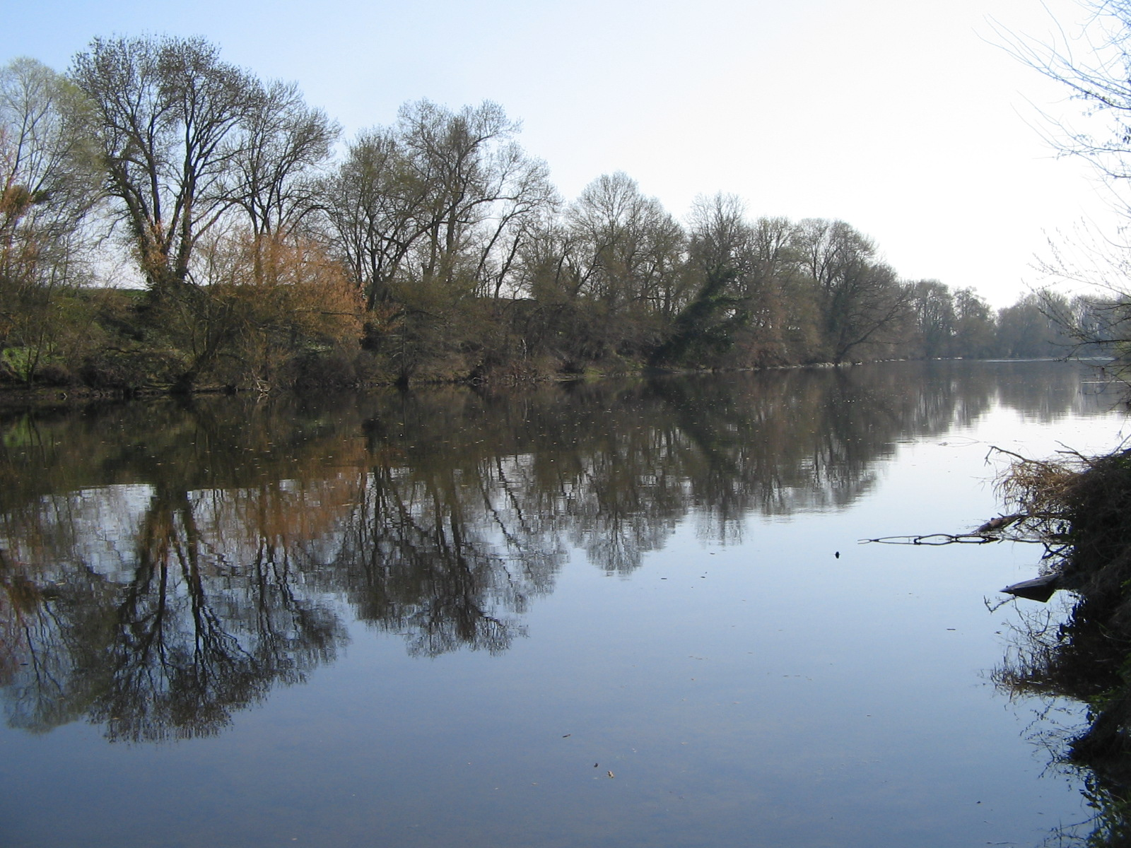 La Creuse à St Rémy-sur-Creuse en mars 2011